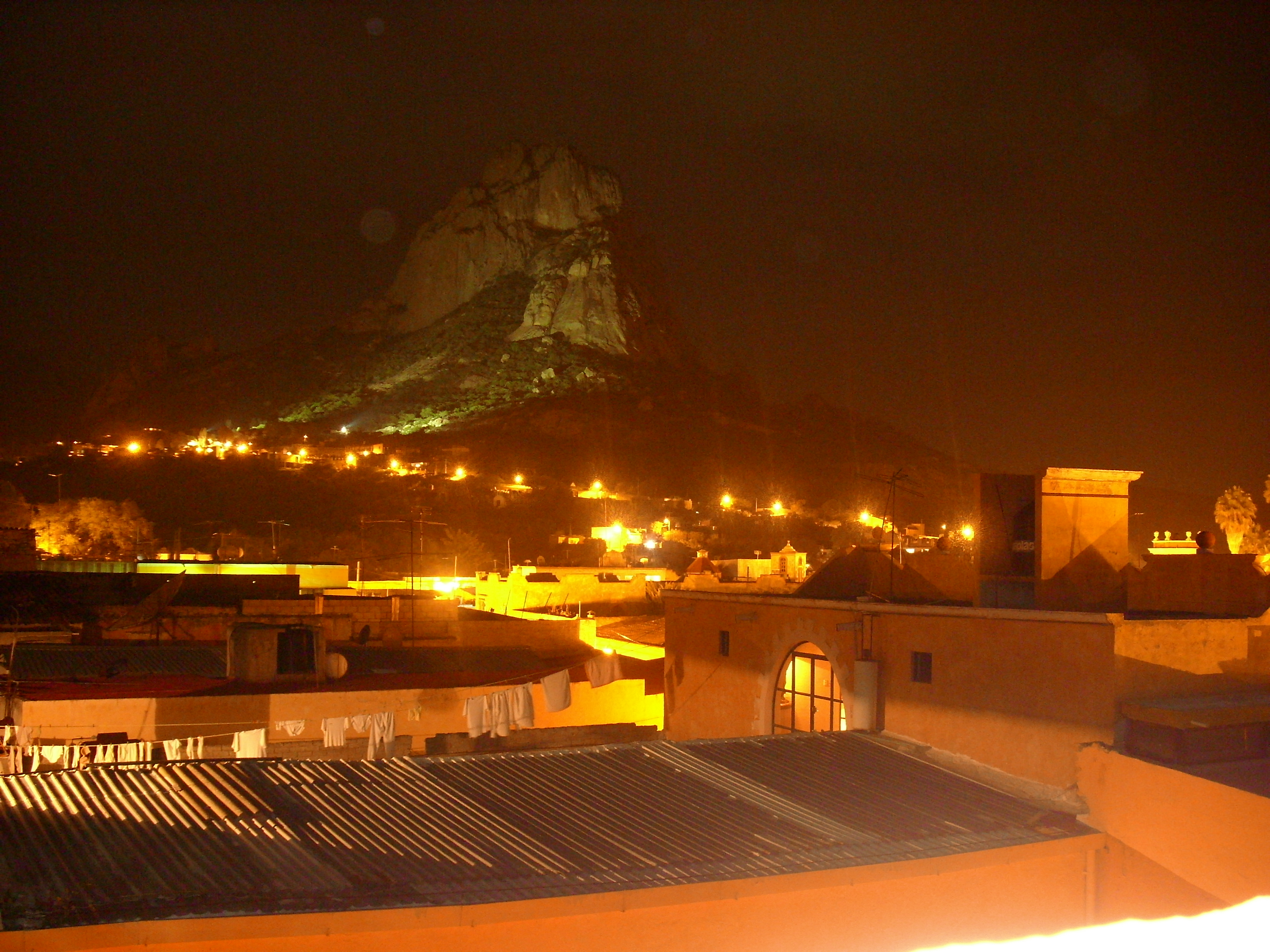 Peña de Bernal de noche desde Villa de Bernal